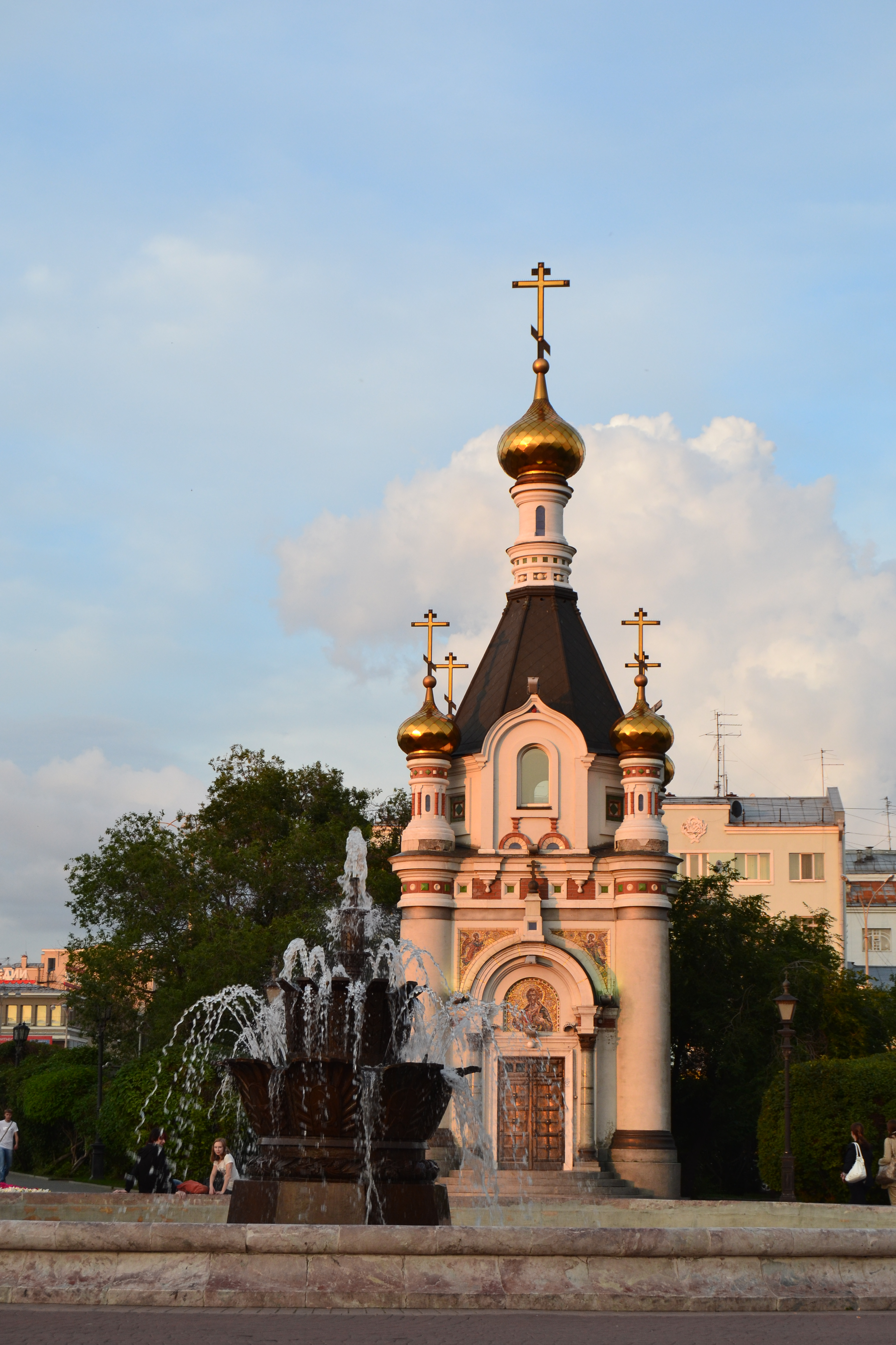 Часовня святой Екатерины на Площади Труда